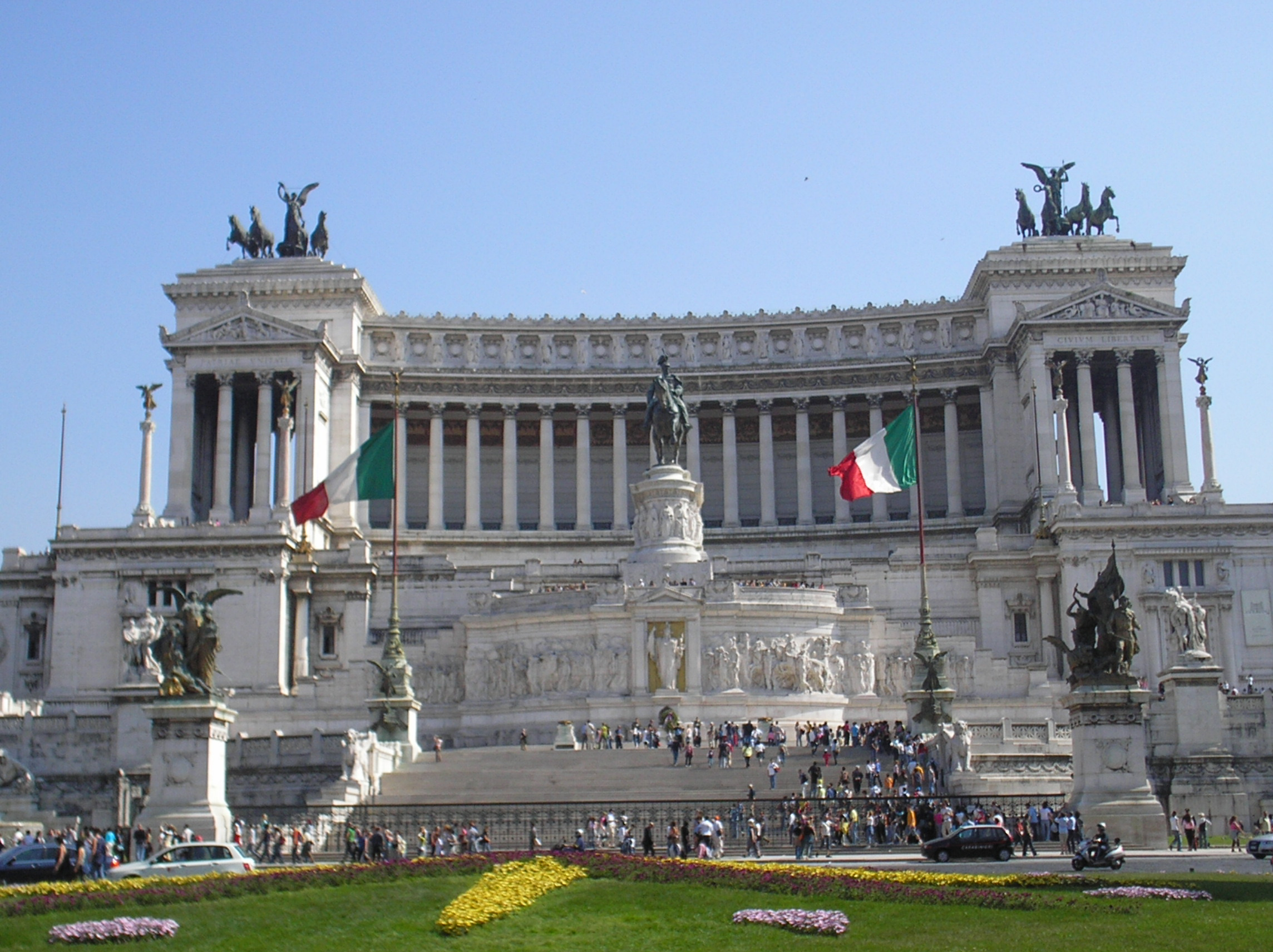 Zelfgemaakte foto voor Rome, nationaal monument van victor Emanuel II